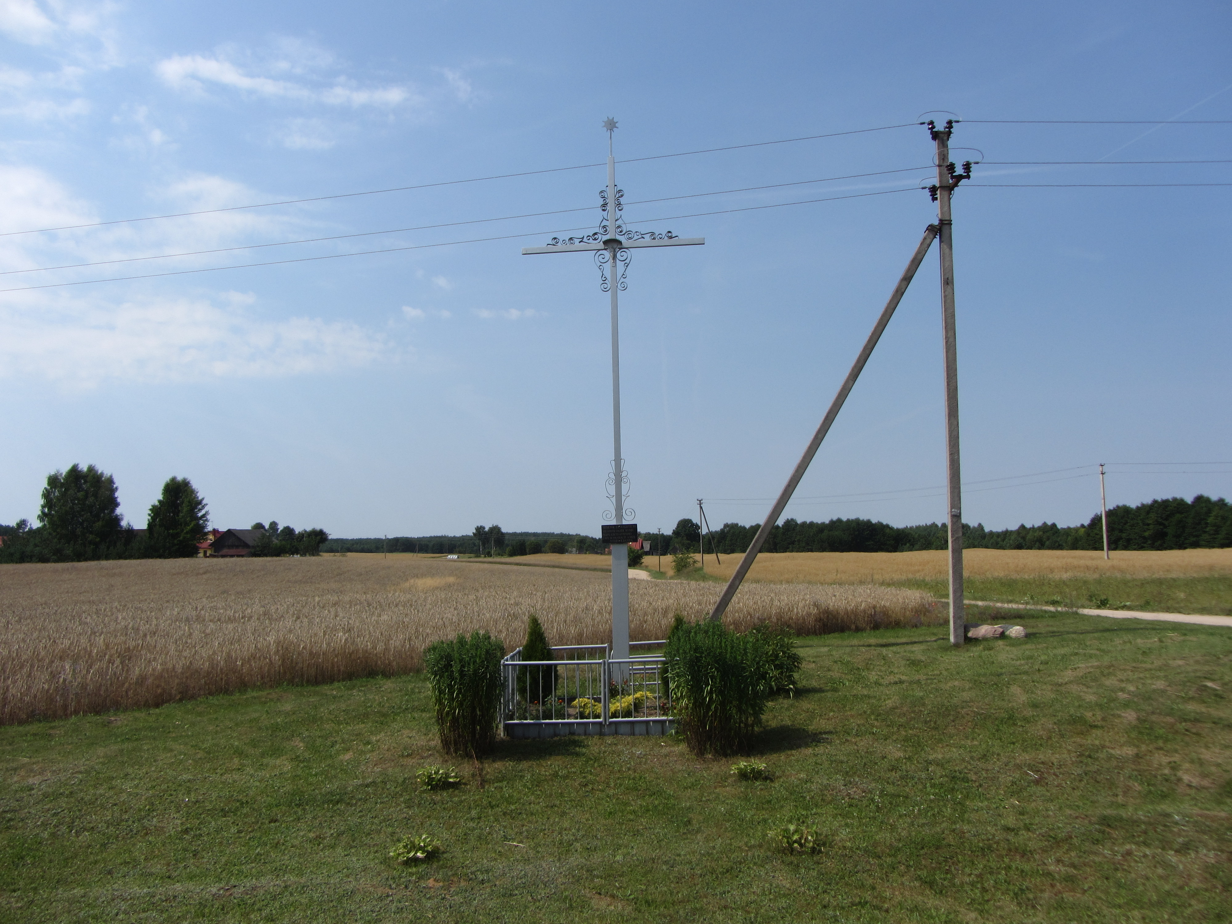 Kapčiamiesčio sen., Lithuania